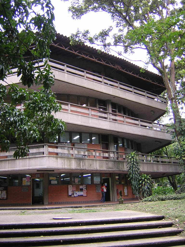 Bloque 11, sede de la Escuela de Idiomas, Universidad de Antioquia. Medellín, Colombia.